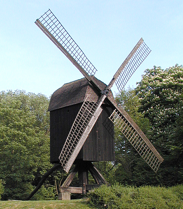 Die alte Mühle im Hermann-Löns-Park